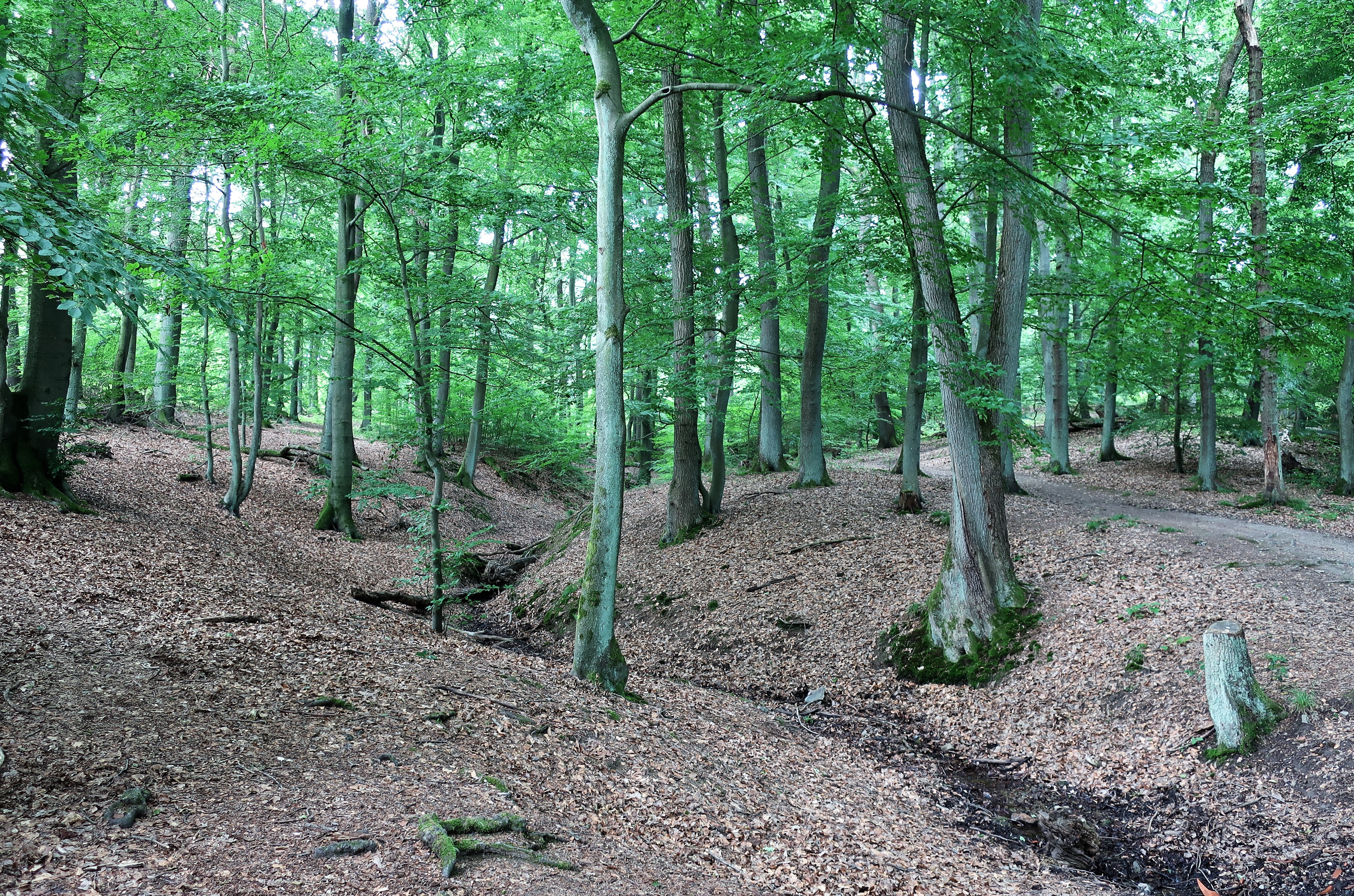 Geschützter Landschaftsbestandteil 1.4.2.60 „Bachschwinde mit Doline Brauckstück“ in Hagen, südwestlich von Holthausen. Es handelt sich um einen Bachlauf von der Quelle bis zur Bachschwinde in einer teilweise mit Abfall verfüllten Doline des Massenkalkes. Die Quellzonen und der Oberlauf des Baches liegen in einem zum Teil naturnahen Laubmischwald, im weiteren Verlauf stehen bachbegleitende Gehölze. Der untere Bachabschnitt wurde verlegt und begradigt.